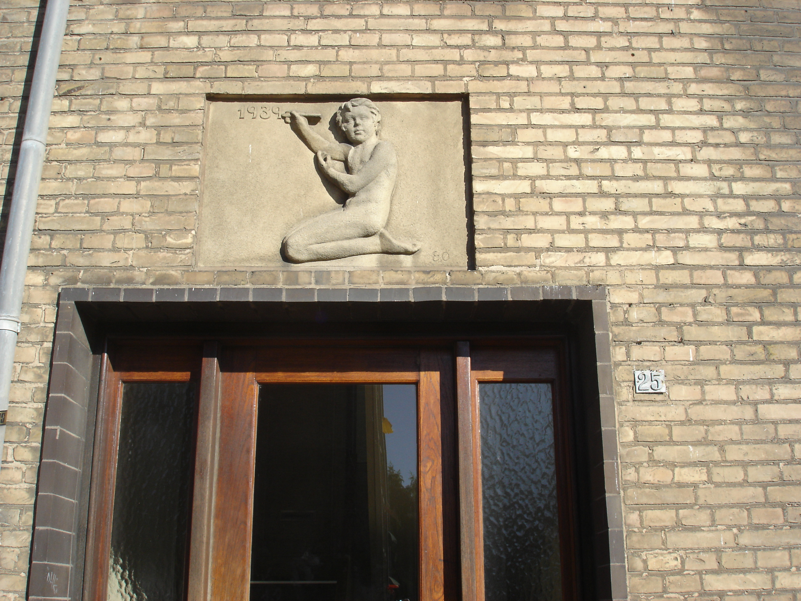 Relief over indgangen til Skanderborgvej 25 i Aarhus, signeret af Elias Ølsgaard